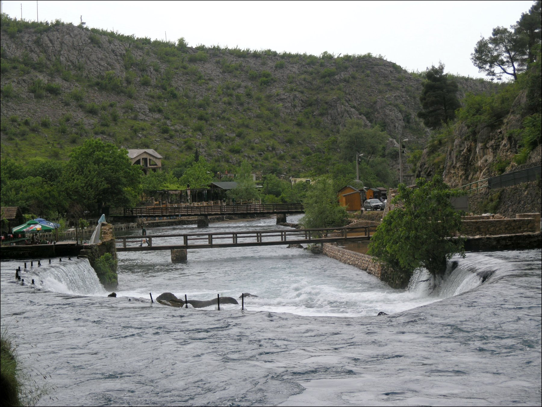 Blagaj, Buna river